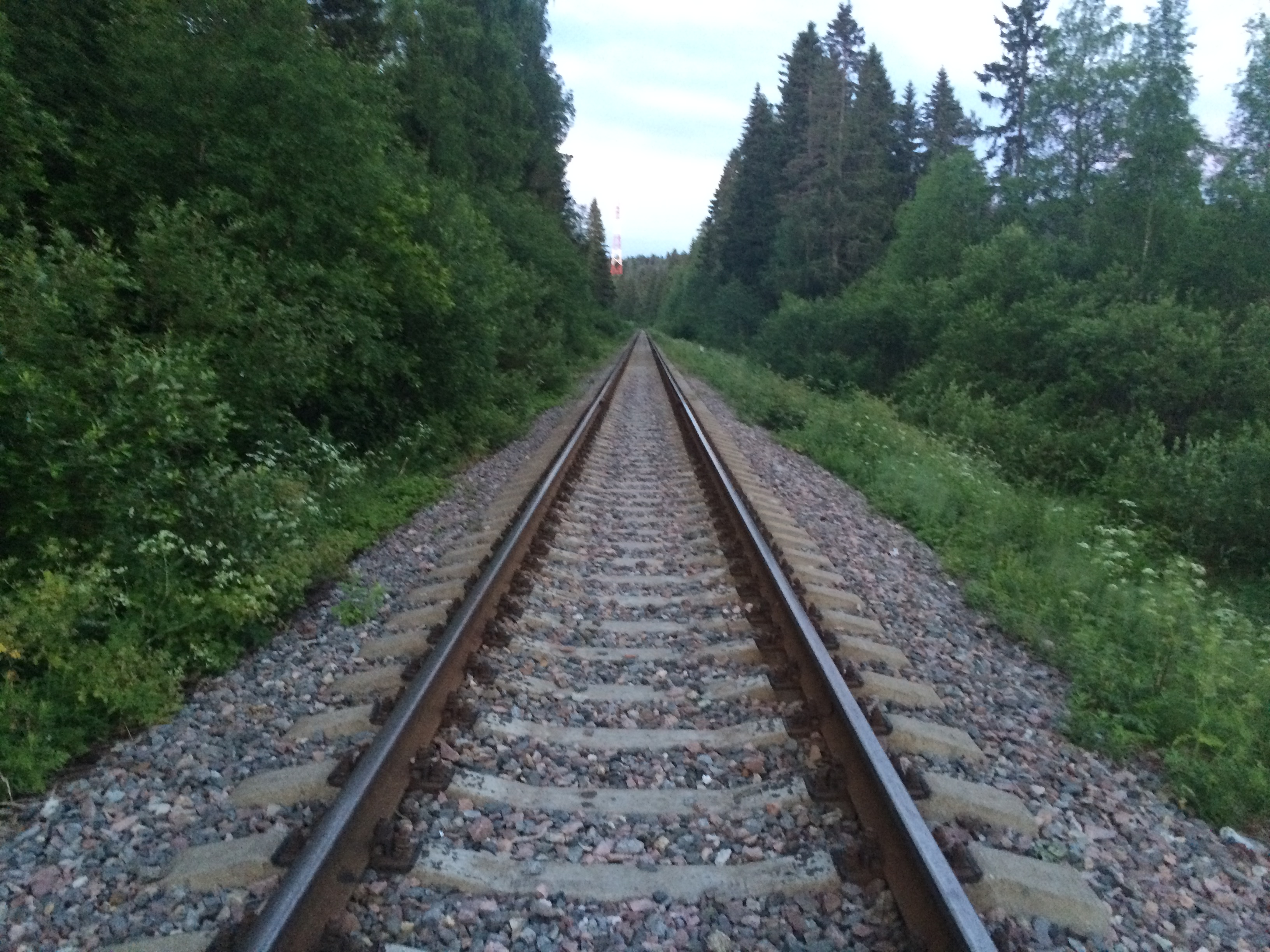 Ояла (Оппола)